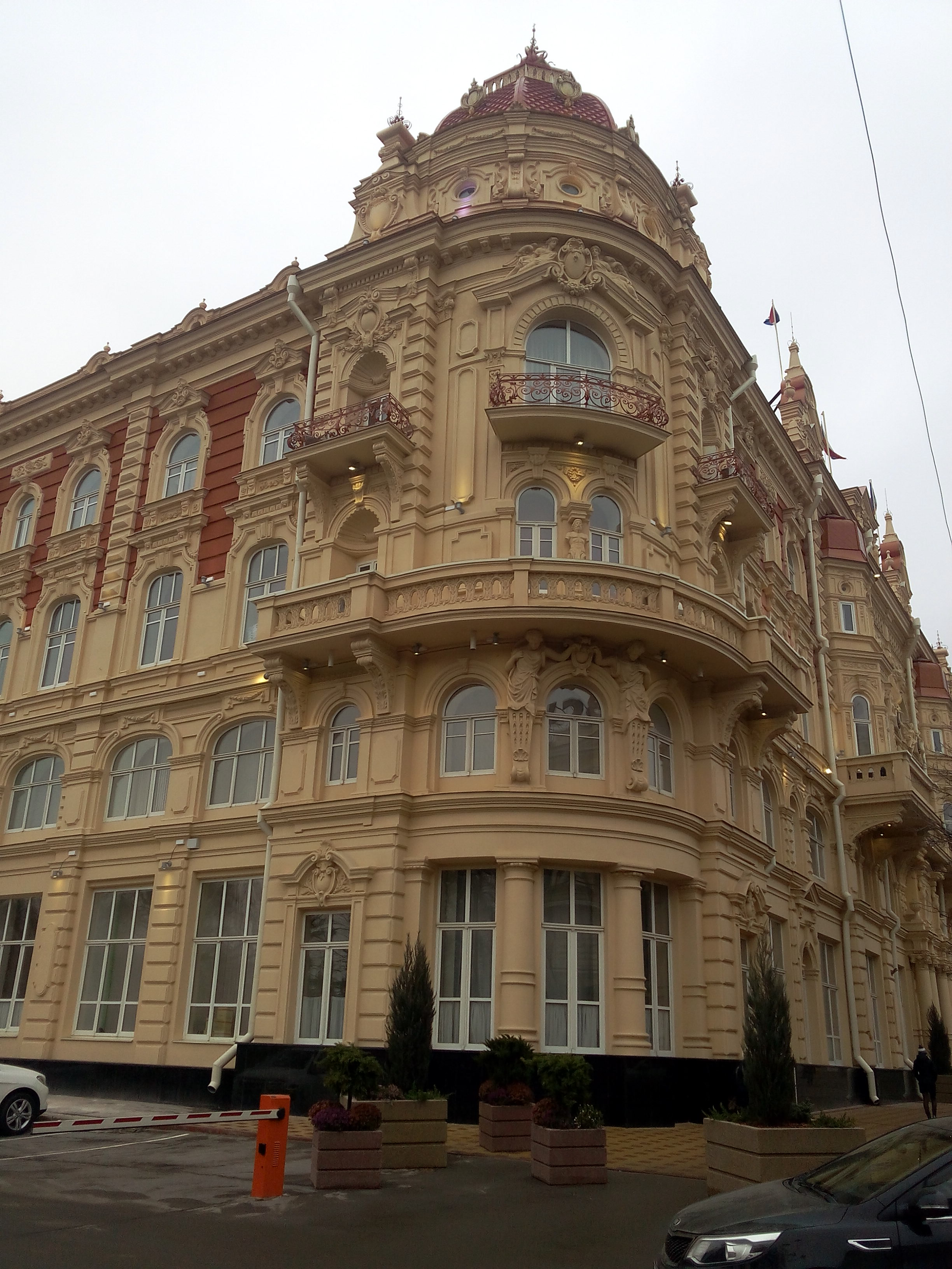 г.Ростов-на-Дону, здание городской Думы